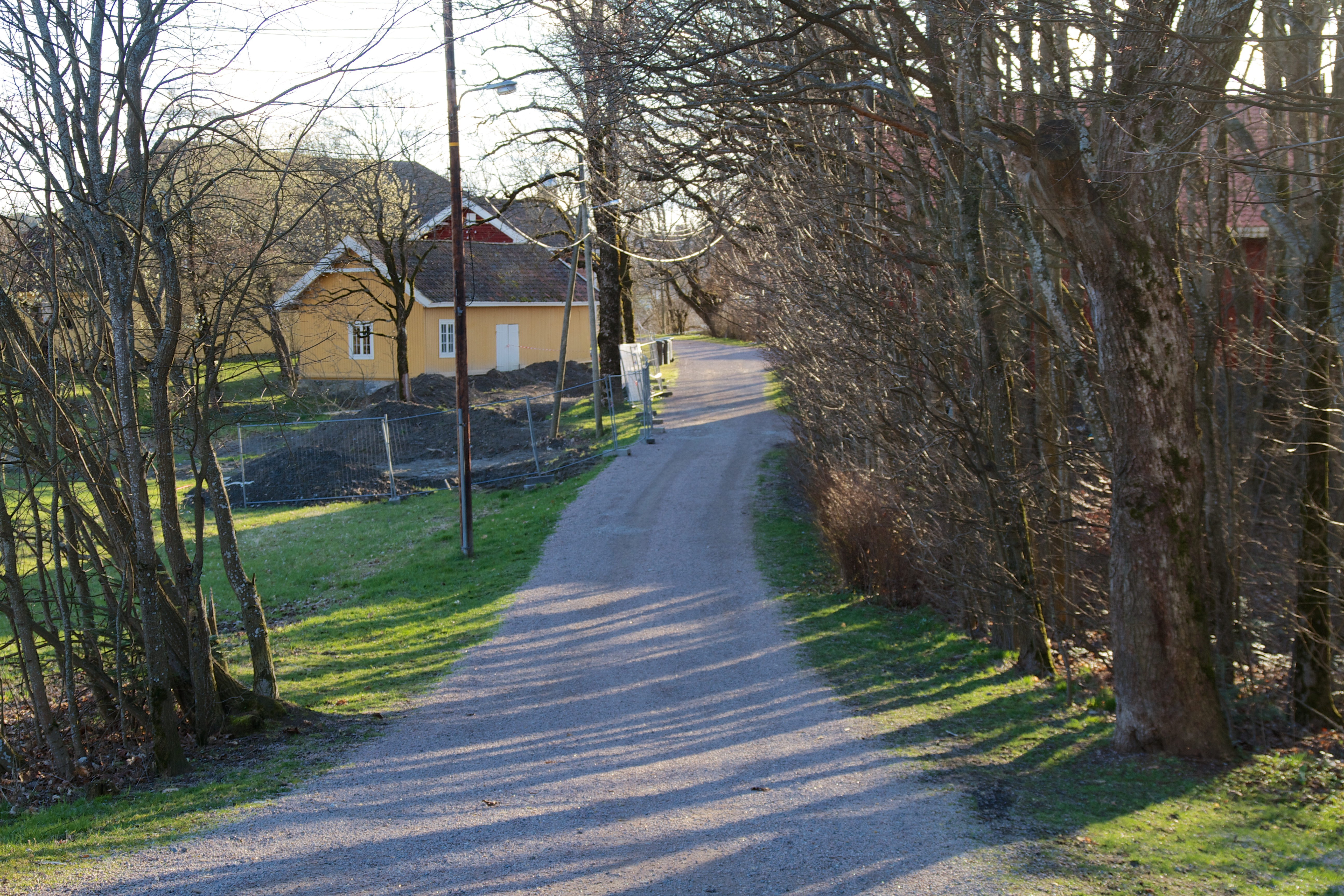 Valborgs vei i Oslo.